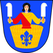 znak obce Hlinsko